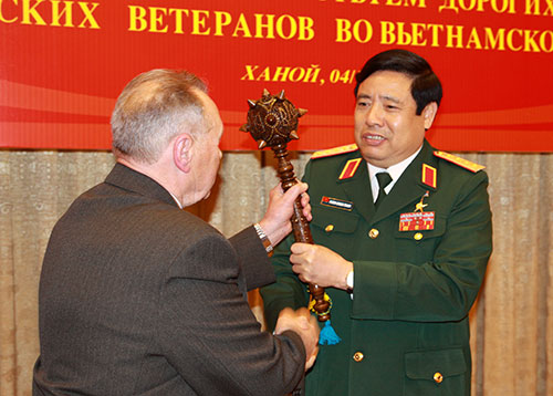 Руководители делегаций ветеранов России, Украины и Белорусии вручают Министру Национальной обороны Вьетнама генералу армии Фунг Куанг Тханю памятные подарки — гетьманские клейноды.